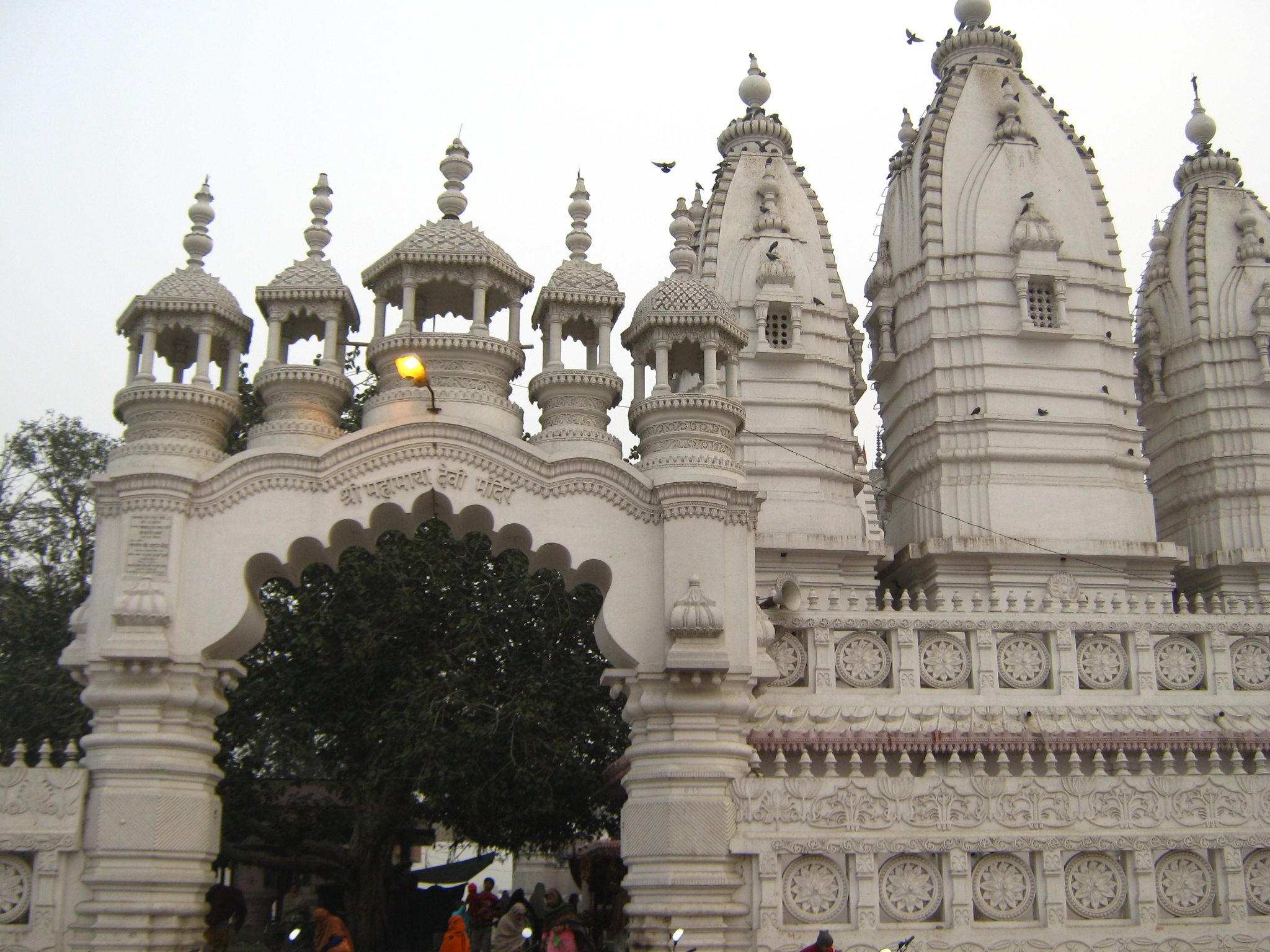 मोदीनगर, गाज़ियाबाद में सीकरी कलां ग्राम स्थित महामाया मन्दिर। इस मन्दिर की स्थानीय लोगों में बहुत मान्यता है। चित्र में मन्दिर का मुख्य द्वार दृश्य है।